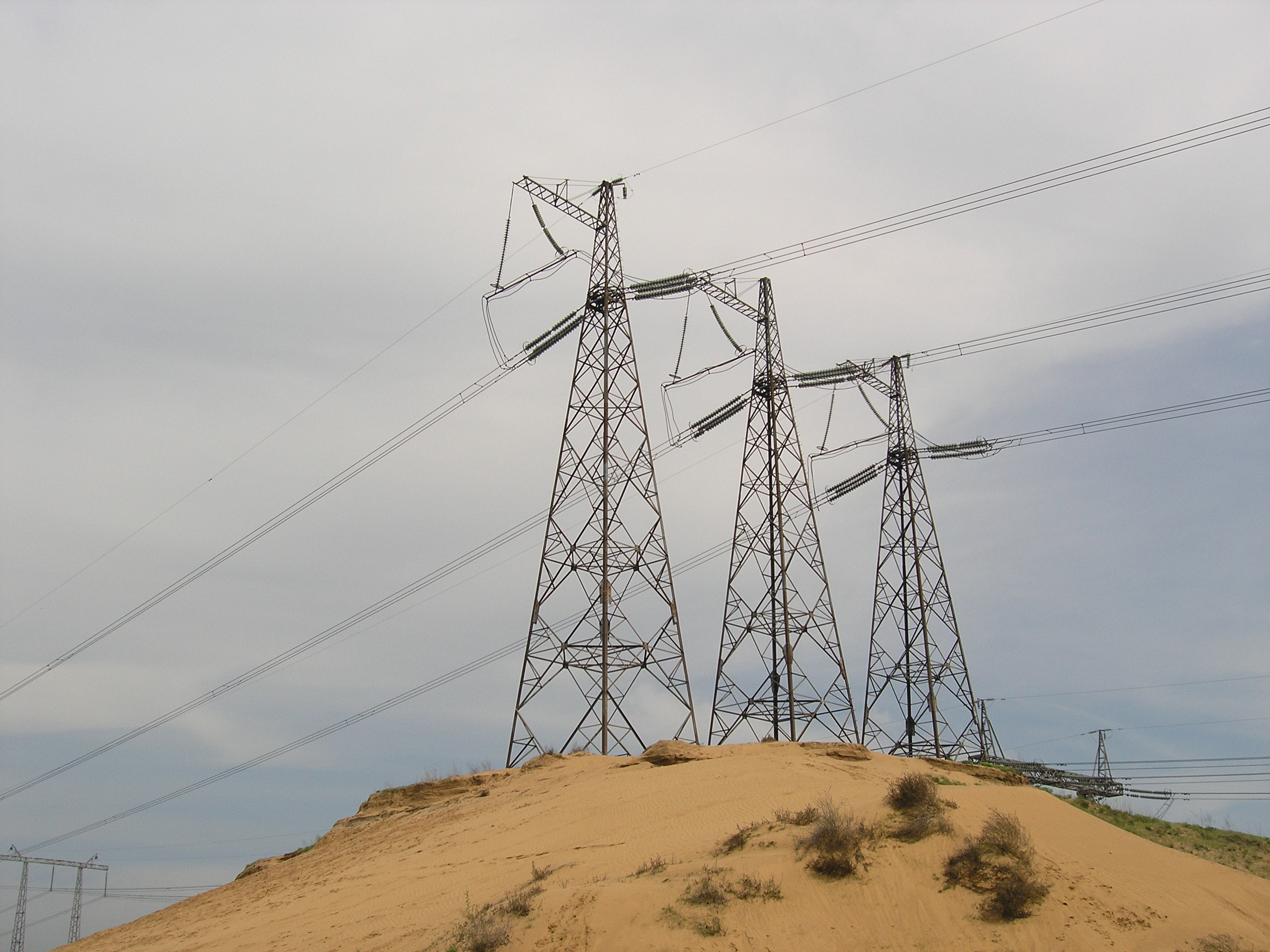 Озеро Пляжное, Тольятти, Россия